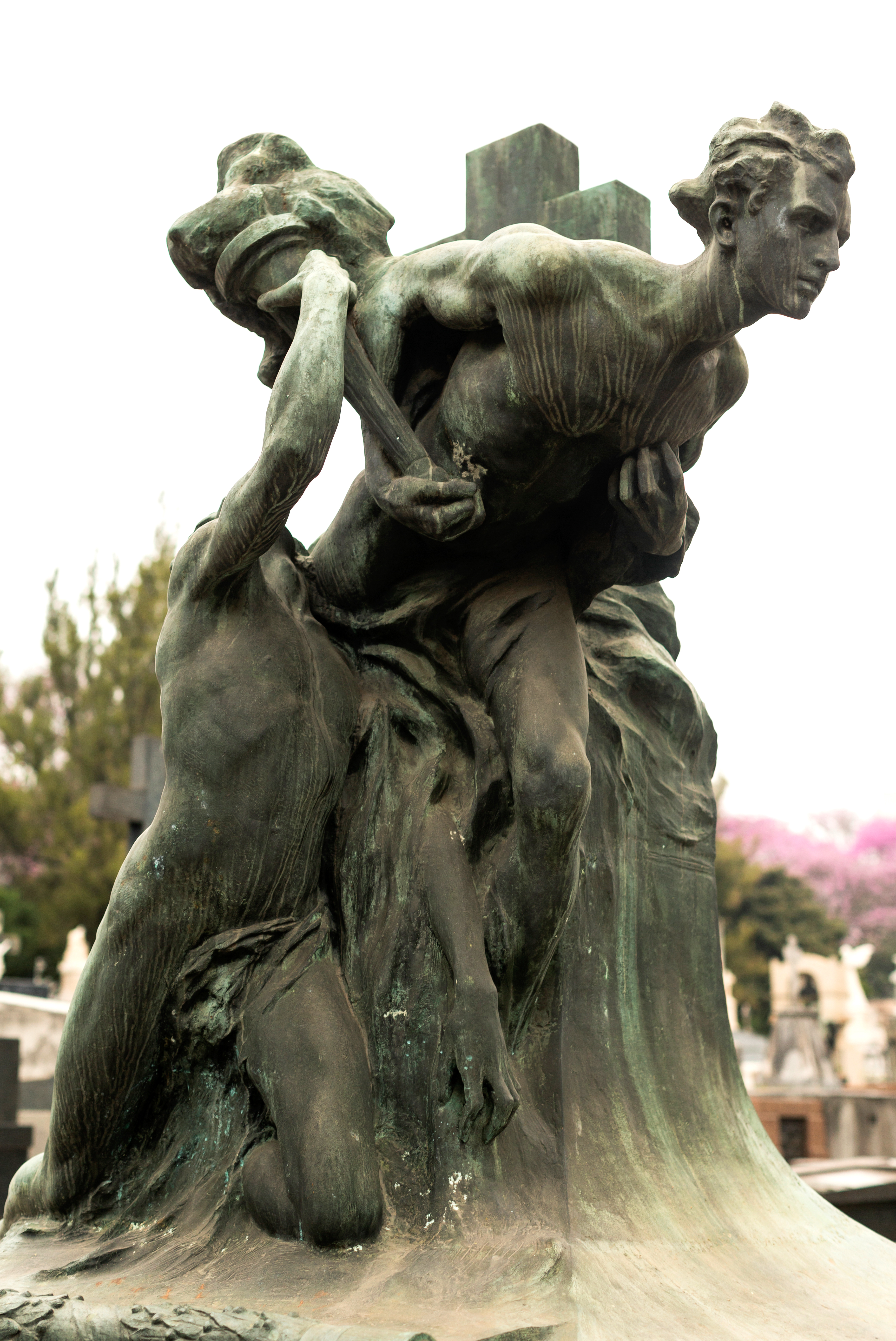 Monumento de cemitério. Túmulo da família Machado (detalhe)